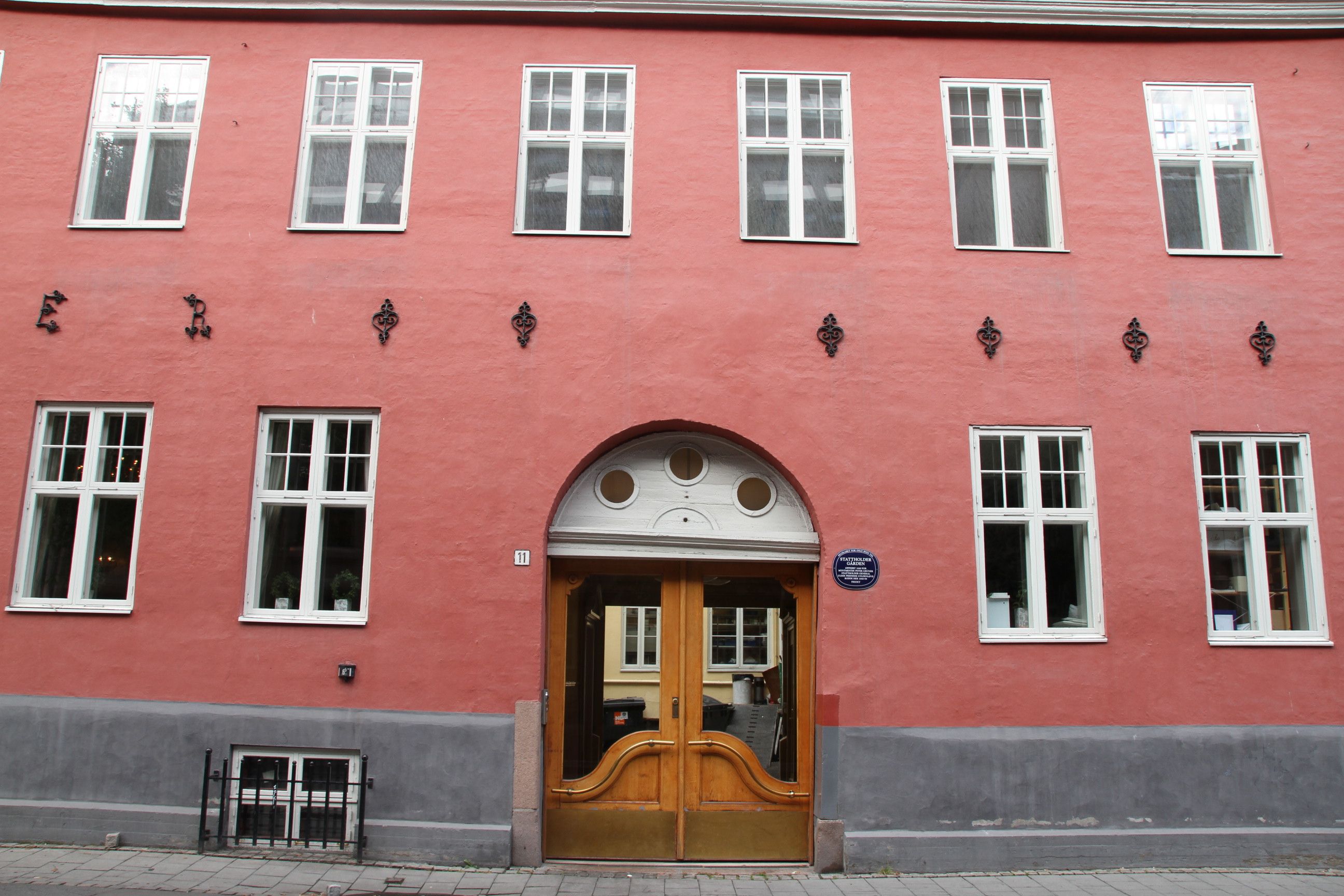 Statholdergården i Kirkegata i Oslo er en av byens eldste sentrumsbygg.